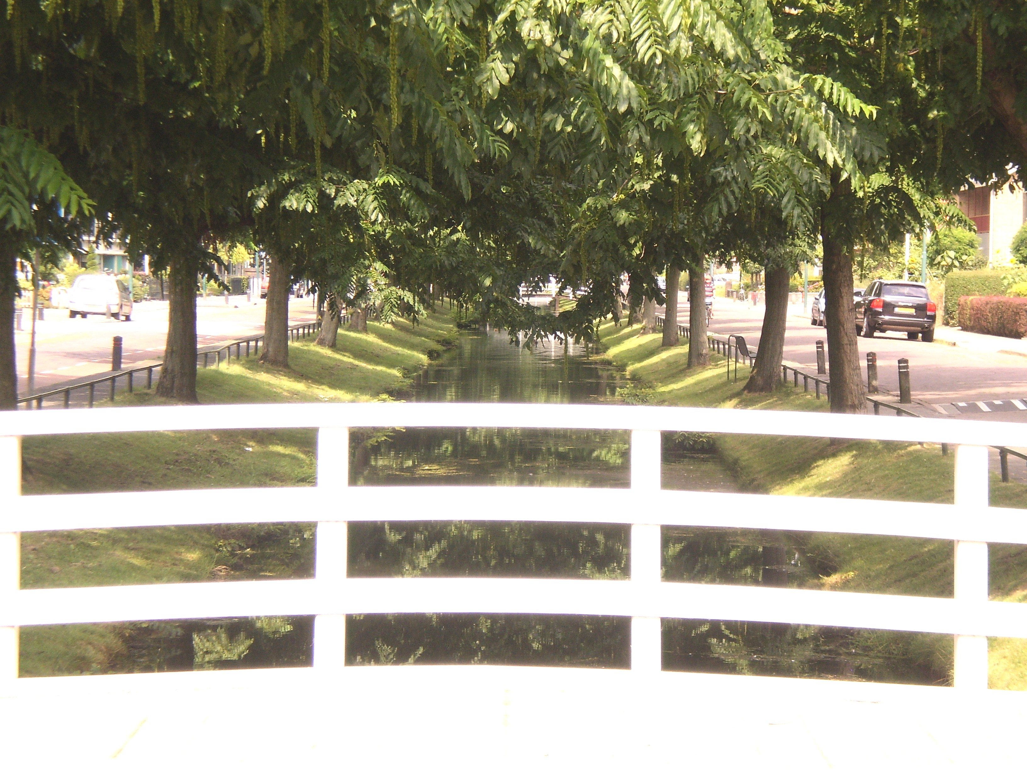 Ofbyld oanbean troch Swarte Kees op 20 augustus 2009